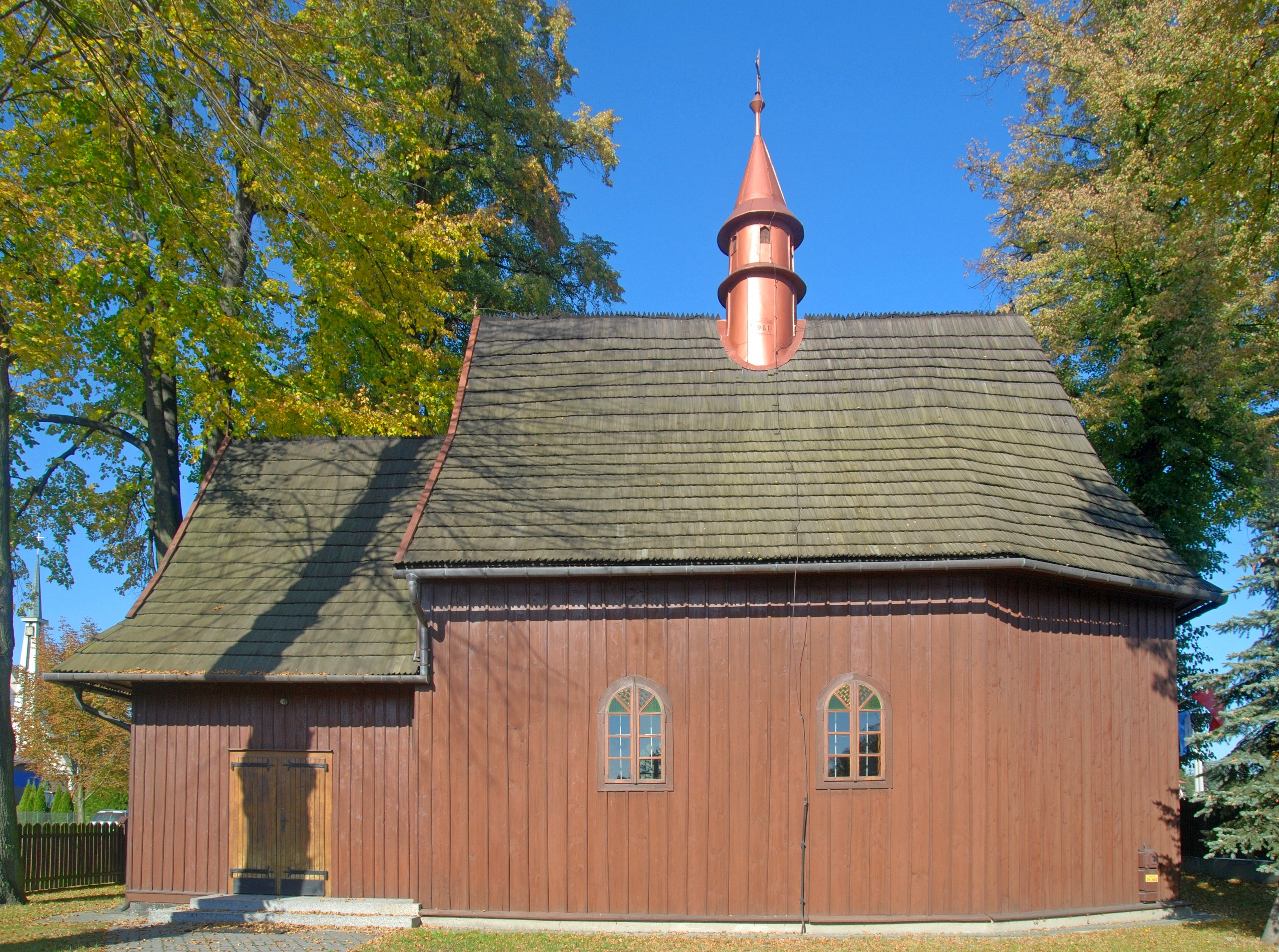 wieś Jurków (powiat brzeski)